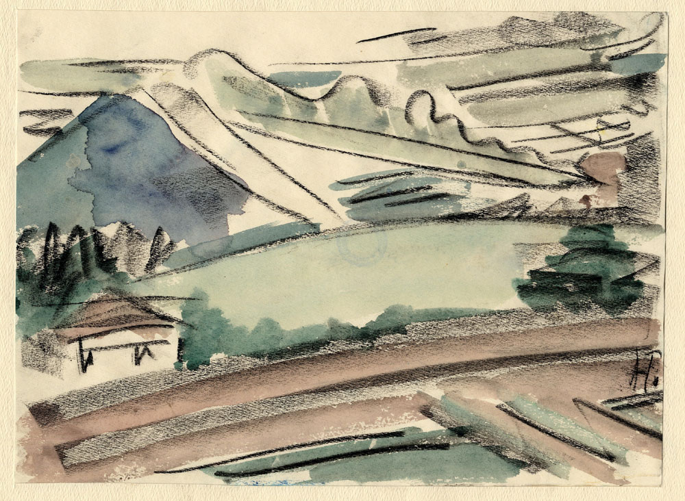 Landschaft